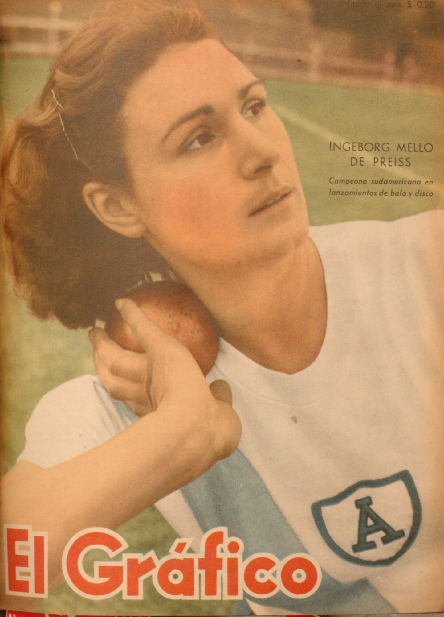 El Grafico del 13 de Junio de 1947. Edicion 1457